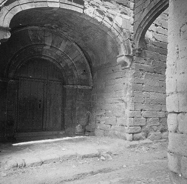 Vista de la porta d ' entrada de l ' església romànica de Santa Maria de Prades .